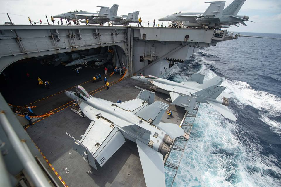 se ve el Hangar y el Ascensor para subirlos a Cubierta con Carrito para empujarlo.